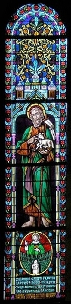 Boppard, Basilika St. Severus, Chorfenster zum 50. Priesterjubiläum des Pfarrers Johann Baptist Berger 1880 mit der Inschrift IOHANNES CHRISTI PRAEVIE BAPTISTA REGIS INCLYTE QUEM DEMONSTRASTI DIGITO FAC SUBVENIRE PAROCHO Johannes, Vorläufer Christi, ruhmreicher Täufer des Königs, mach, dass er, auf den du mit dem Finger gewiesen hast, dem Pfarrer zu Hilfe kommt.